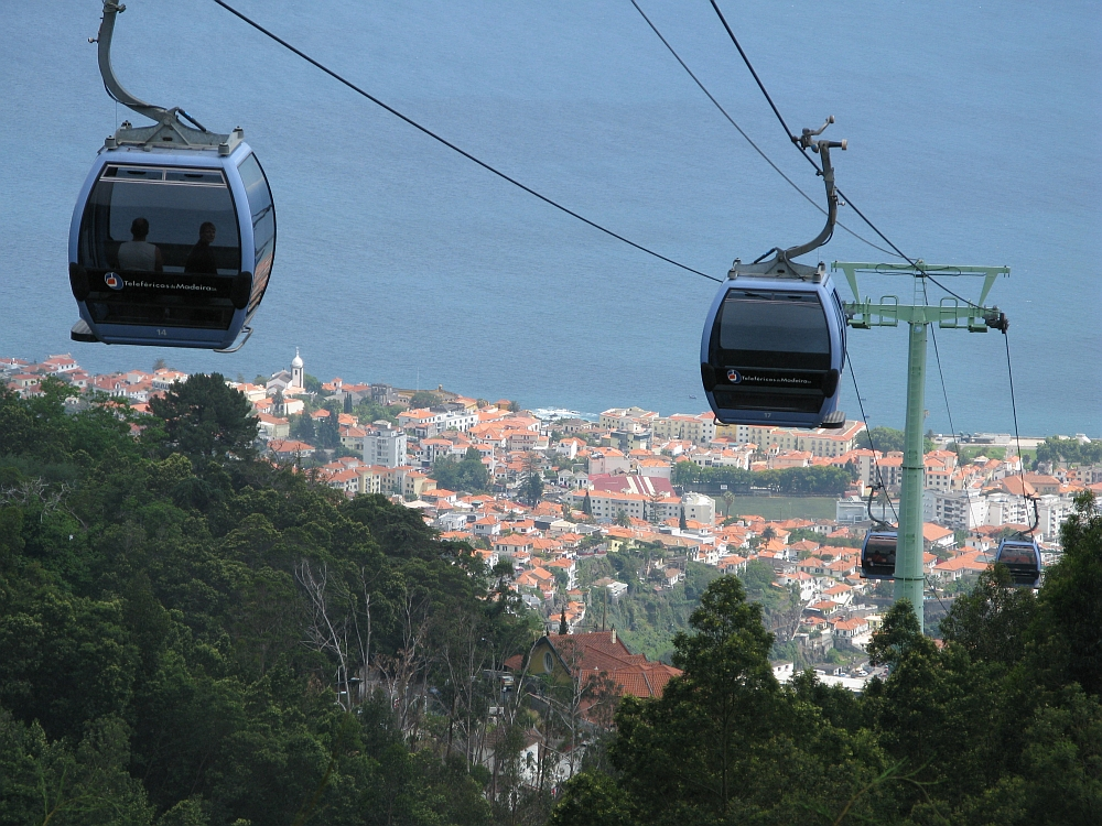 Madeira Portugal, 2008.